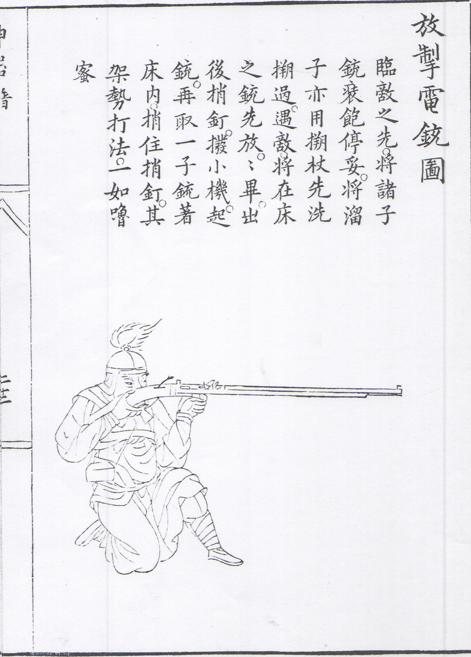 神器譜第二十二頁右半放掣電銃圖。